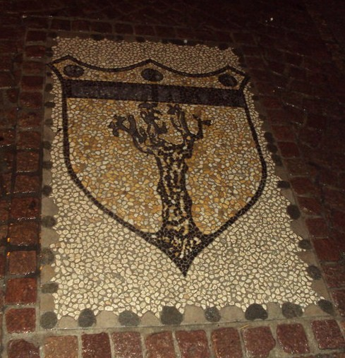 Stemma quartiere Zeveto di Chiari